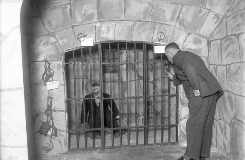 Die deutsche Kriminal-Polizei im Kampf gegen das zunehmende Verbrechertum! Der Strafvollzug vor 30 Jahren. Eine Dunkelhaftzelle im Keller des Polizei-Instituts. So wurden früher renitente Strafgefangene behandelt. Der Gefangene wurde mit Ketten an die Wand angeschlossen und musste so mehrere Tage auf dem kalten Steinboden zubringen.